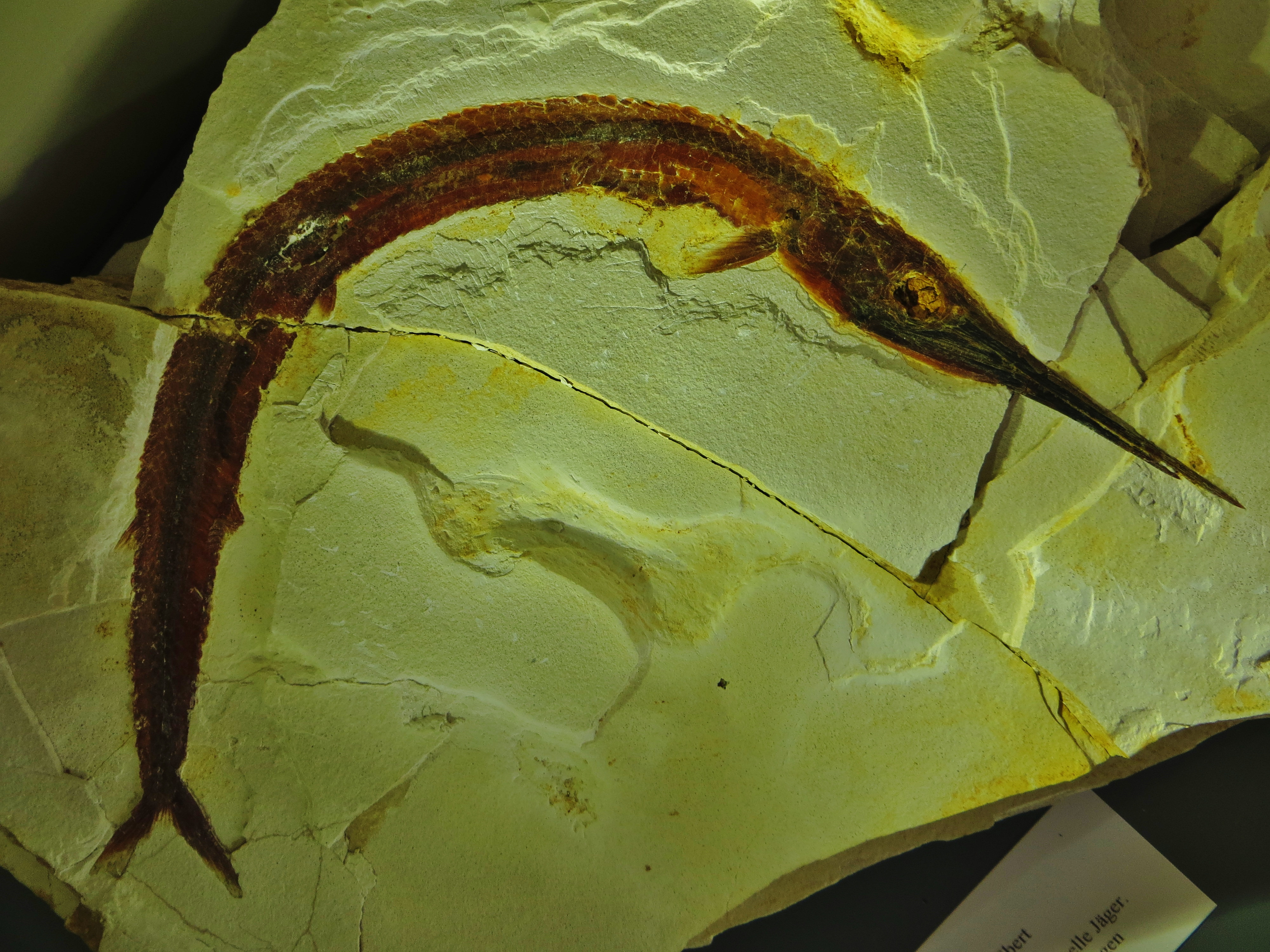 Took the picture at Jura-Museum, Eichstaett